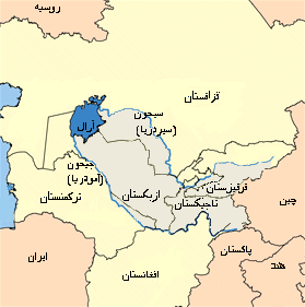 Transoxiana map